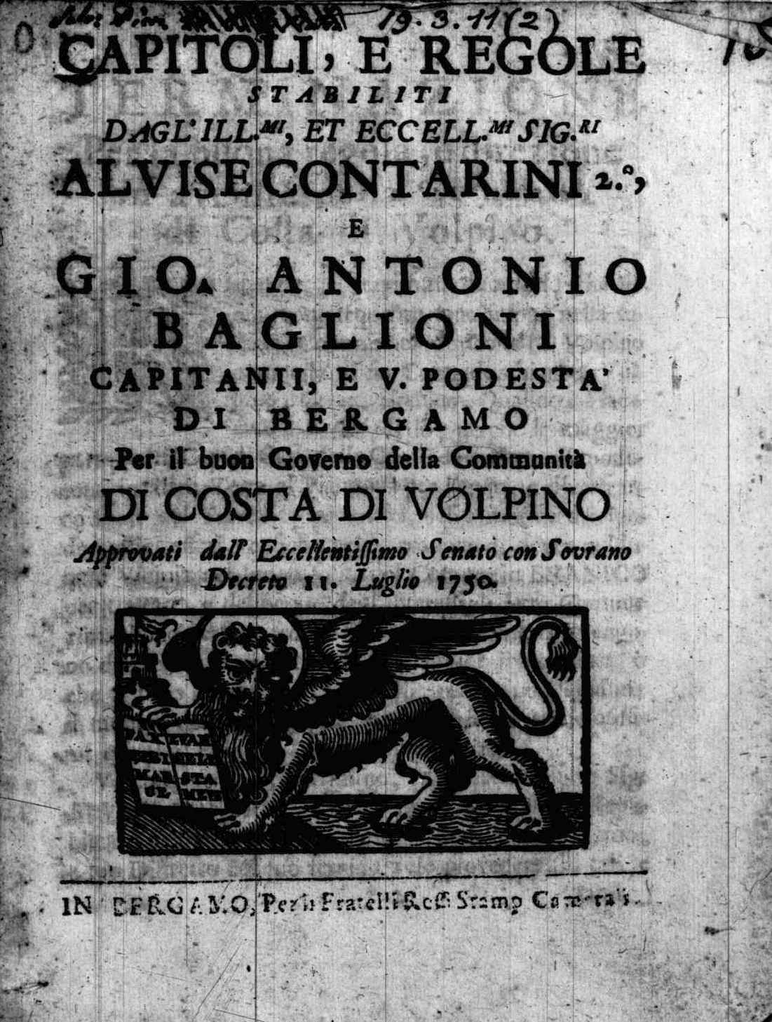 Frontespizio